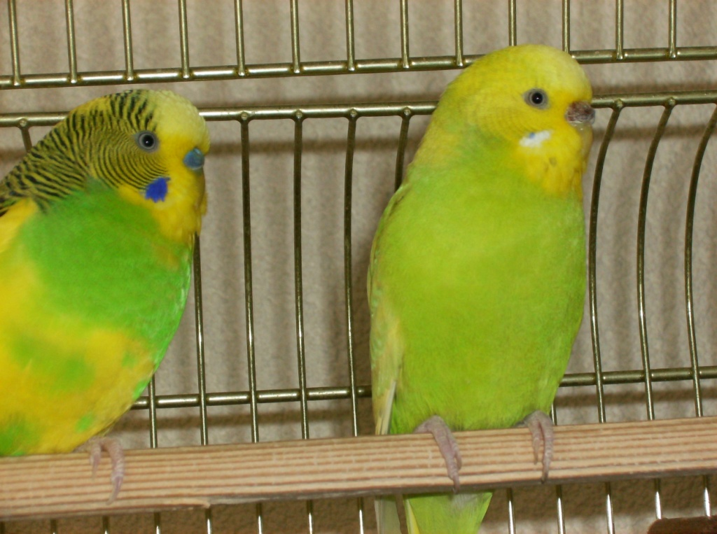 Licensieinfo: Foto zelf gemaakt, Naamsvermelding verplicht. Naamsvermelding als u het wilt kopieren: Calvintijd als naamsvermelding. Beschrijving: Grasparkieten Rikki en Doerak met hun veren.